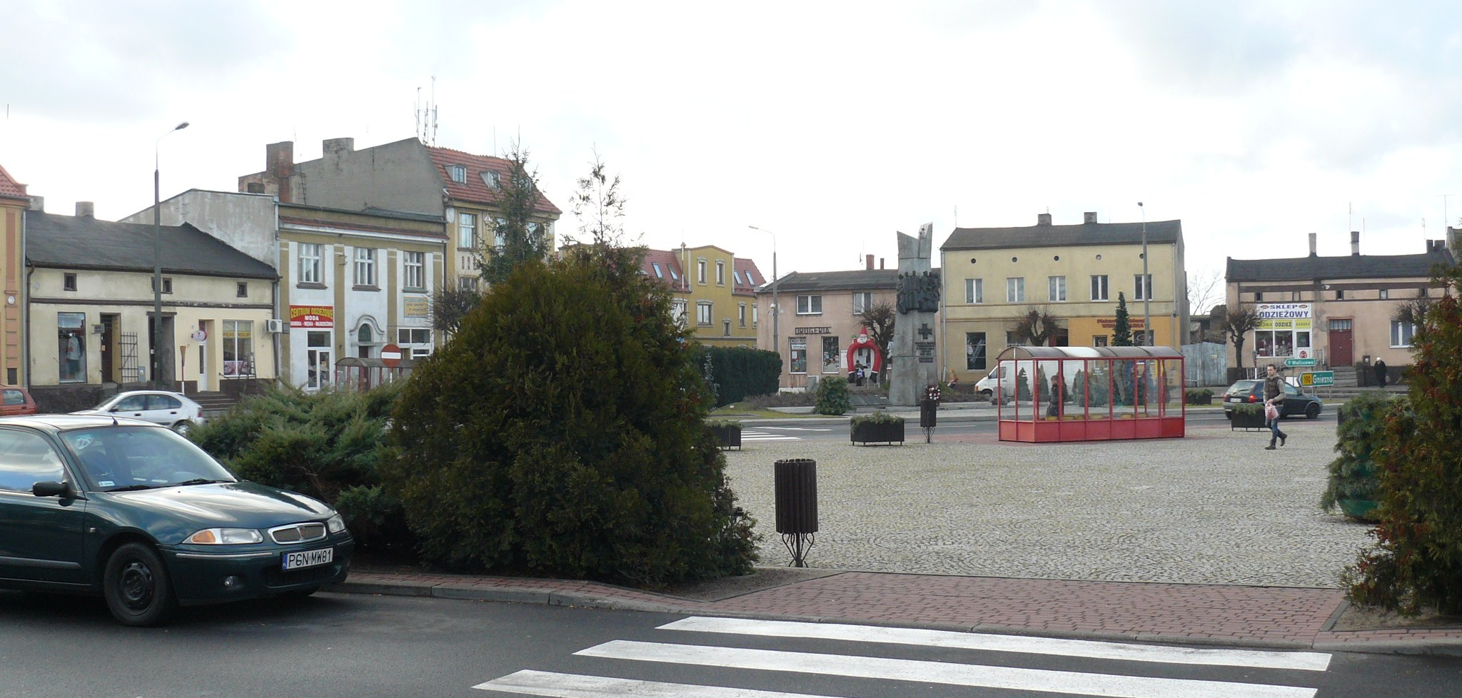 Kłecko - market square and monument.